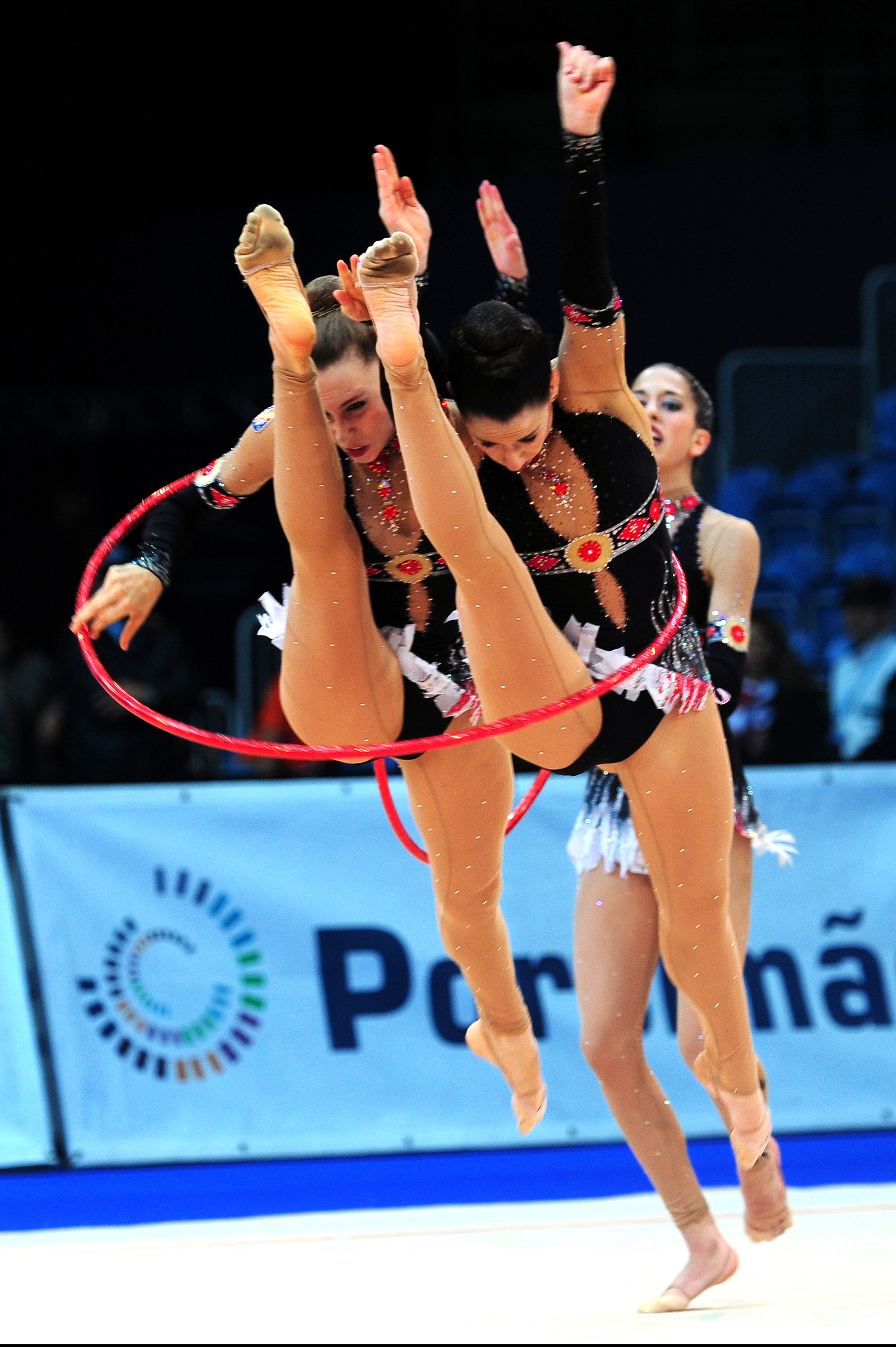 El conjunto español en la Copa del Mundo de Portimao en 2009.